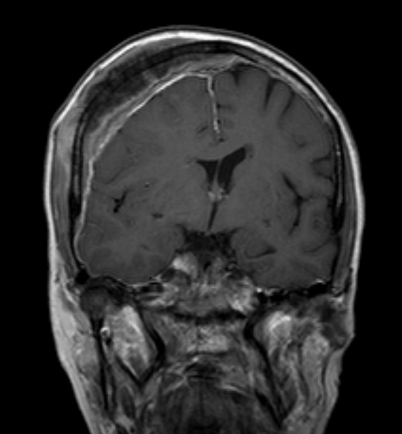 Expansive osteoplastische Metastase der Schädelkalotte bei einem Patienten mit Prostata-Karzinom. Magnetresonanztomographie T1 mit Kontrastmittel. Man erkennt die Ausdehnung des metastatischen Gewebes über die Knochengrenzen hinaus und sieht auch eine Kontrastmittelaufnahme der Meningen als Zeichen der Infiltration. Siehe auch CT.